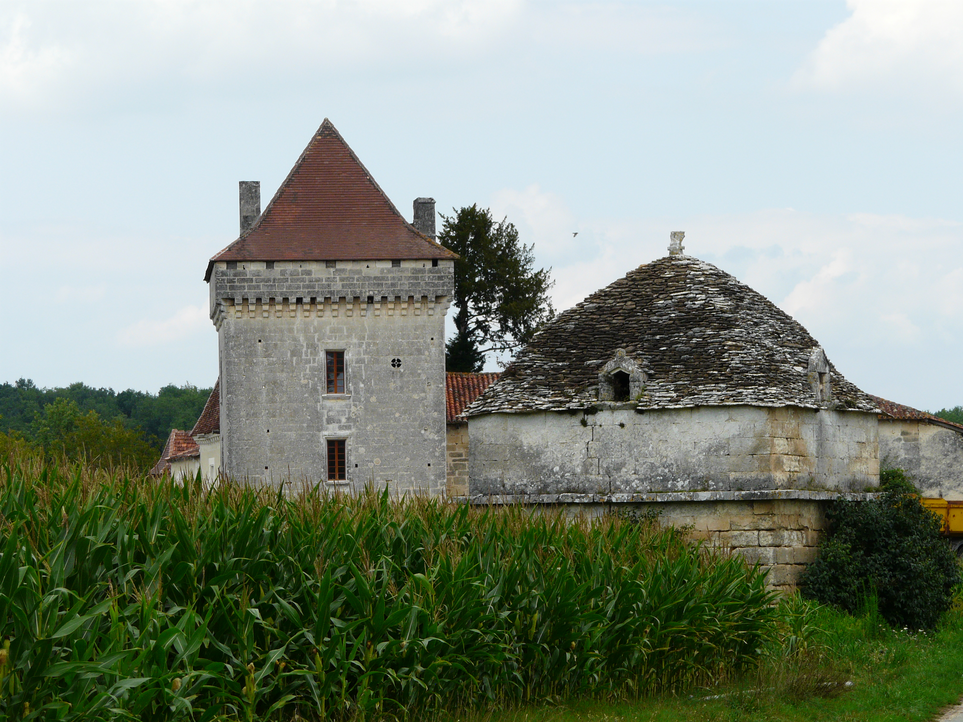 Le donjon et le pigeonnier du château de Narbonne, Saint-Just, Dordogne, France. .